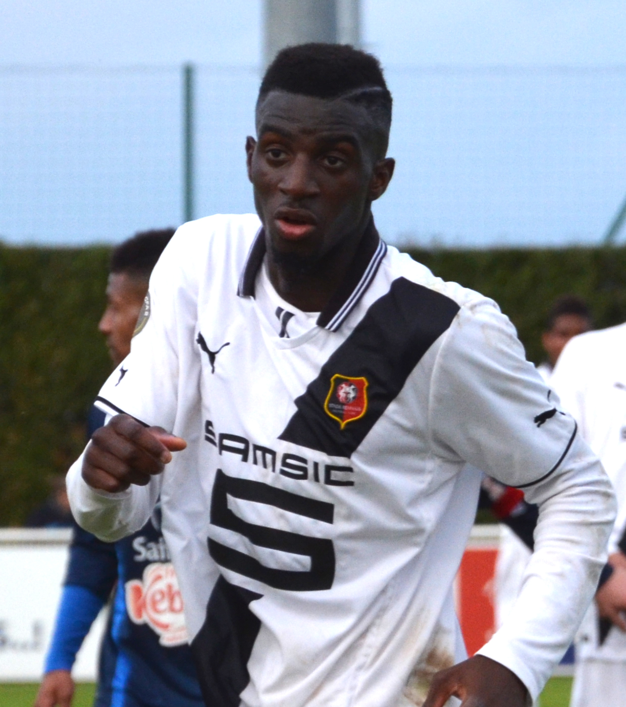 Photo prise lors du match de Championnat de France amateur 2 de football opposant le FC Saint-Lô au Stade rennais. Ici, les joueurs rennais Tiémoué Bakayoko.